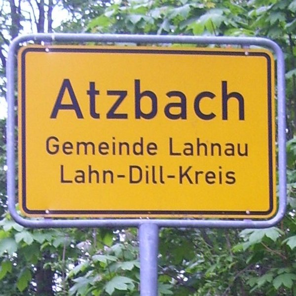 Ortschild von Lahnau, Ortsteil Atzbach (Hessen)